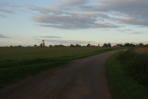 Beaulieu (Nièvre)